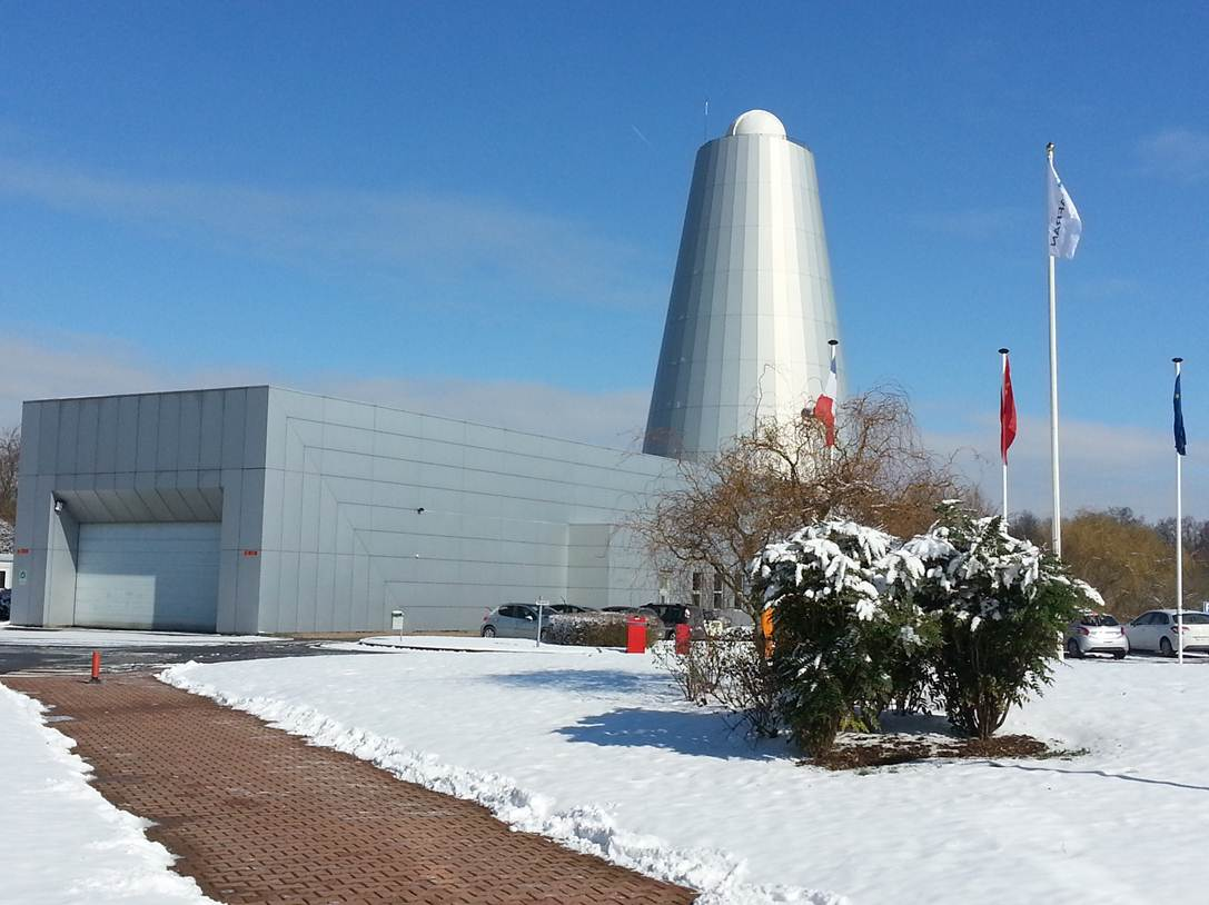 batiment Grands miroirs